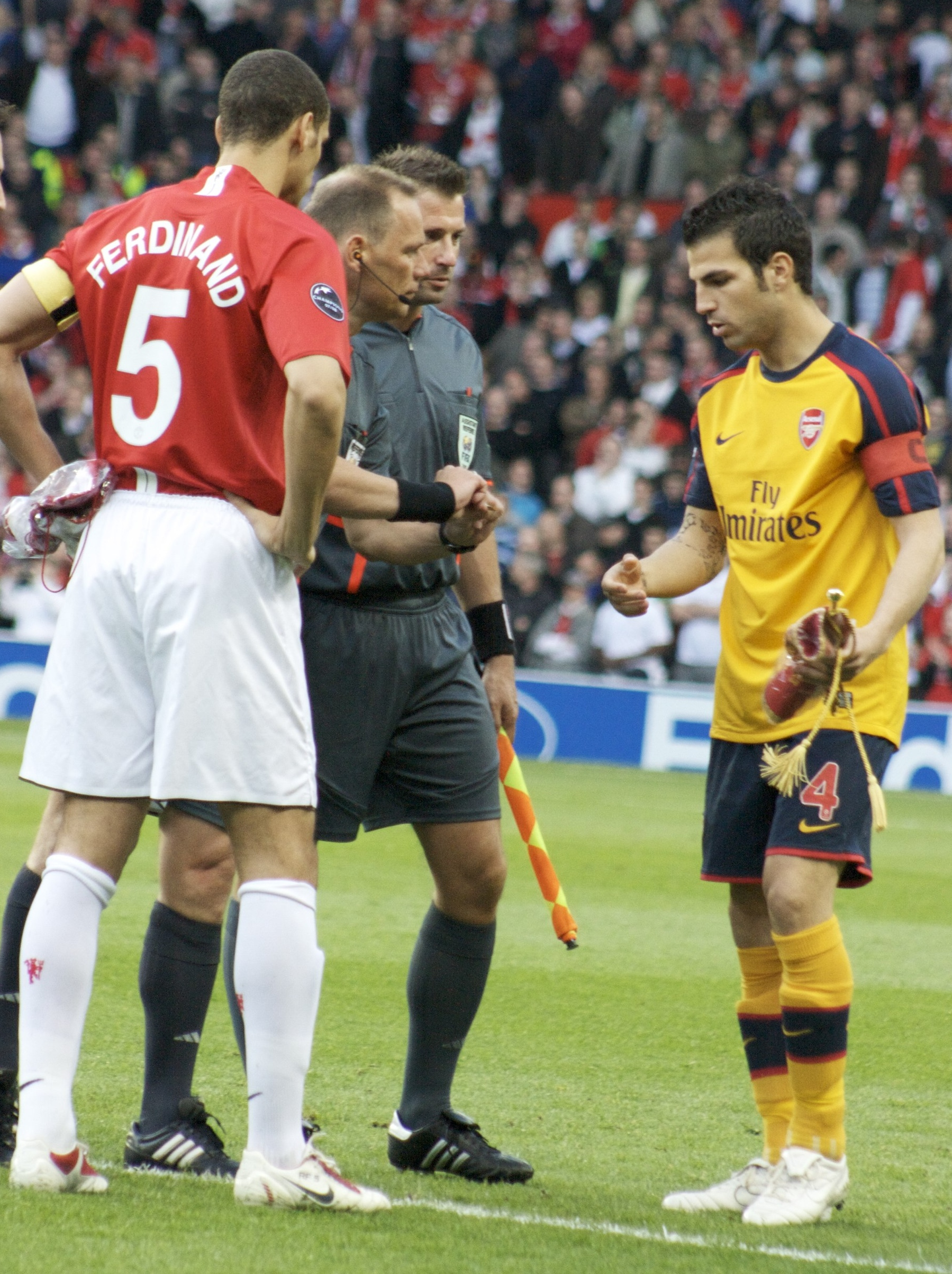 Rio Ferdinand & Cesc Fabregas